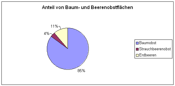 Anteil von Obst- und Beerenanbauflächen